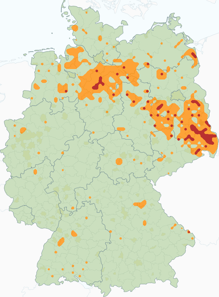 Vorkommen (besetzte Rasterzellen) von Wölfen in Deutschland im Monitoringjahr 2017/18 (orange = Gesamtvorkommen, rot = Reproduktion). Auf Basis einer in der Karte nicht dargestellten 10-km-Rasterzellen-Einteilung